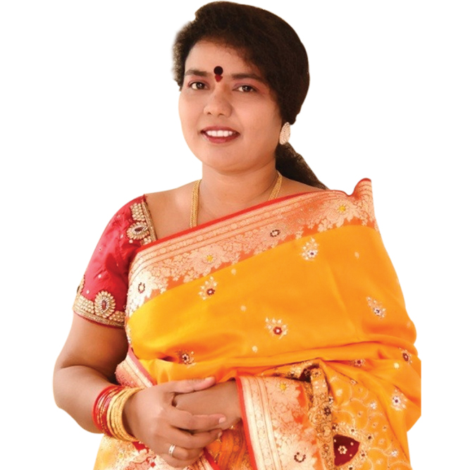 కొయ్యాన శ్రీవాణి, ఆంధ్ర ప్రదేశ్ మహిళా కమీషన్ మెంబర్